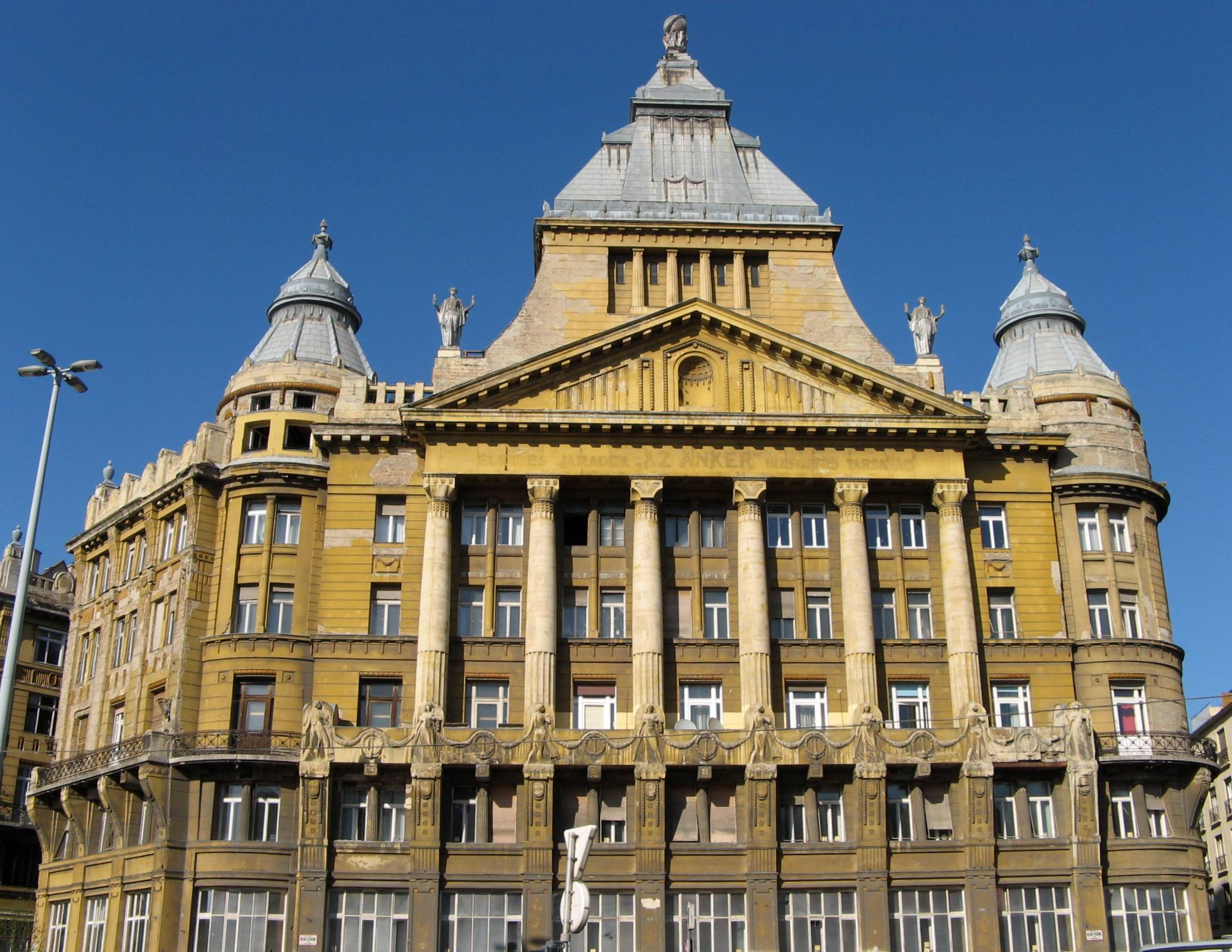 Anker Palace (Anker-palota), Deák Square, Budapest (Ignác Alpár, 1910).